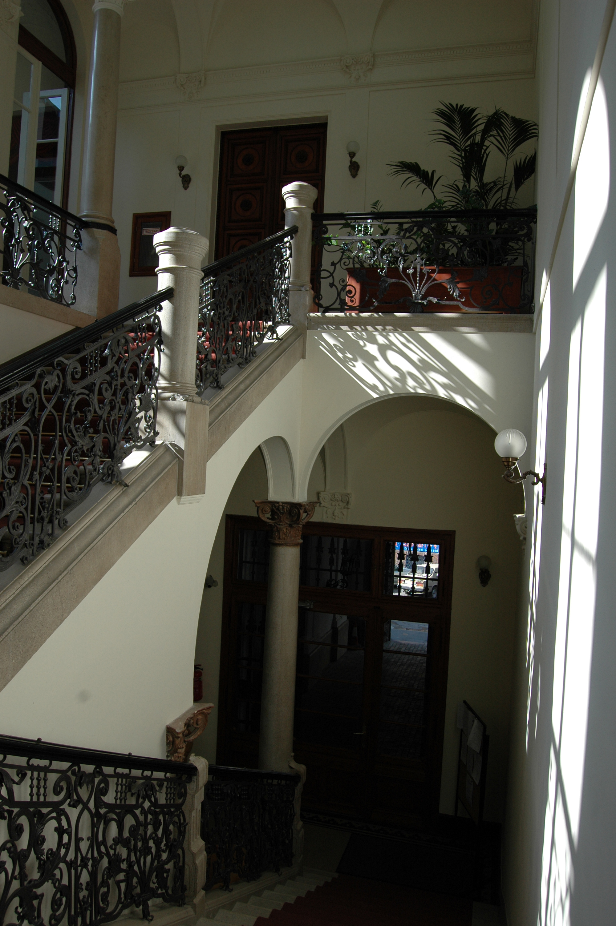 A Történeti Levéltár épületében